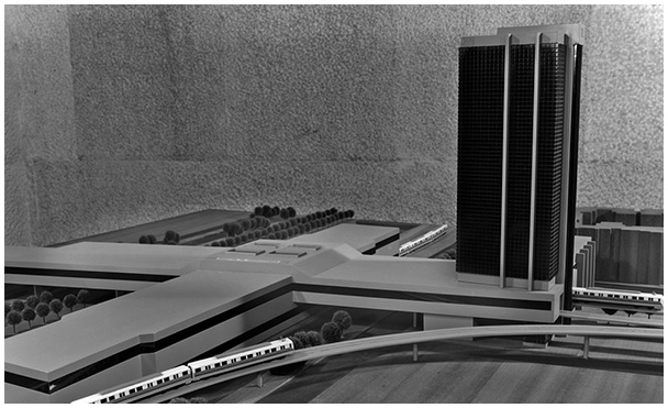 Maqueta de la estación proyectada La Macarena del Metro de Medellín